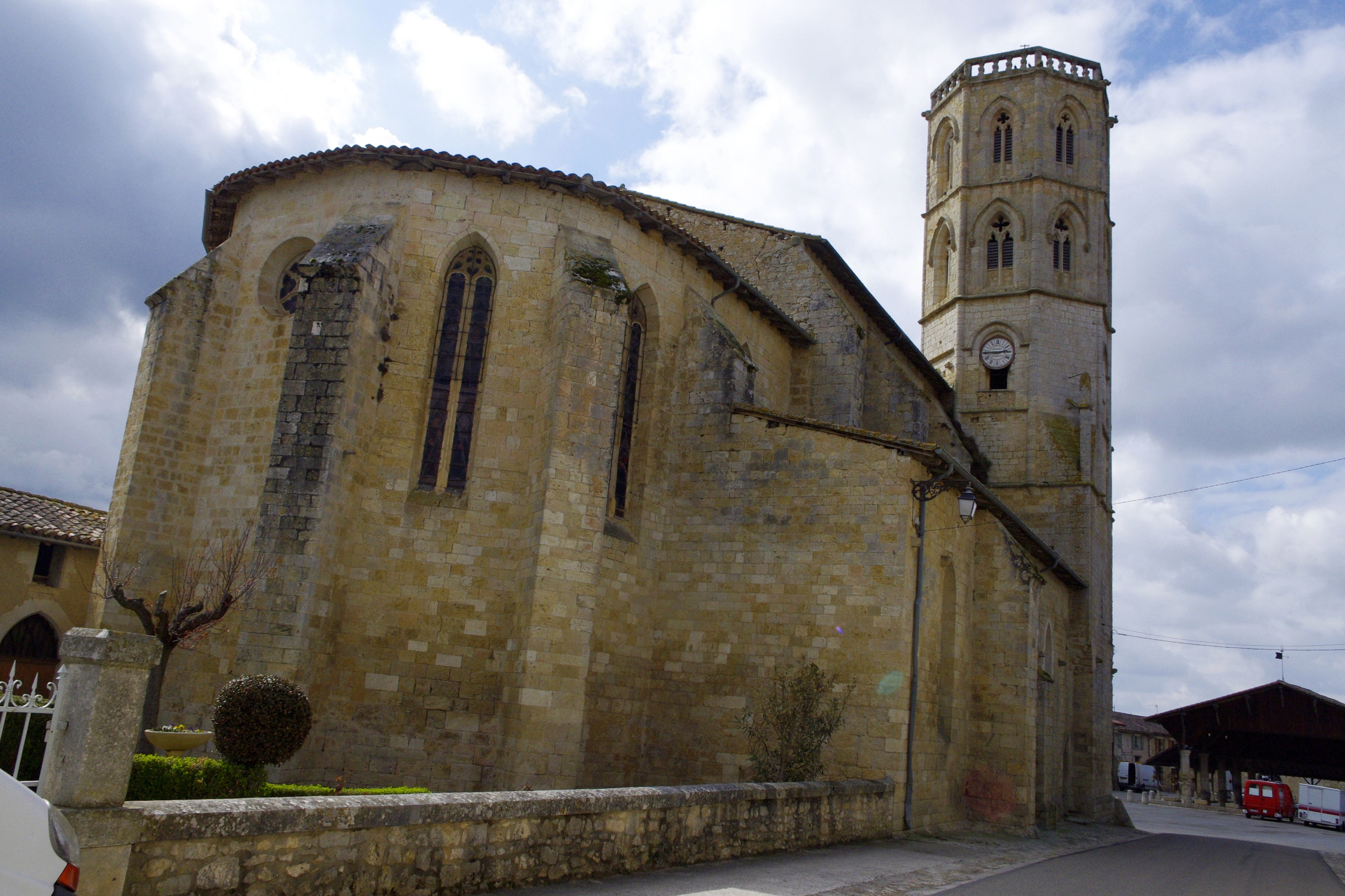 Monfort, Gers - église